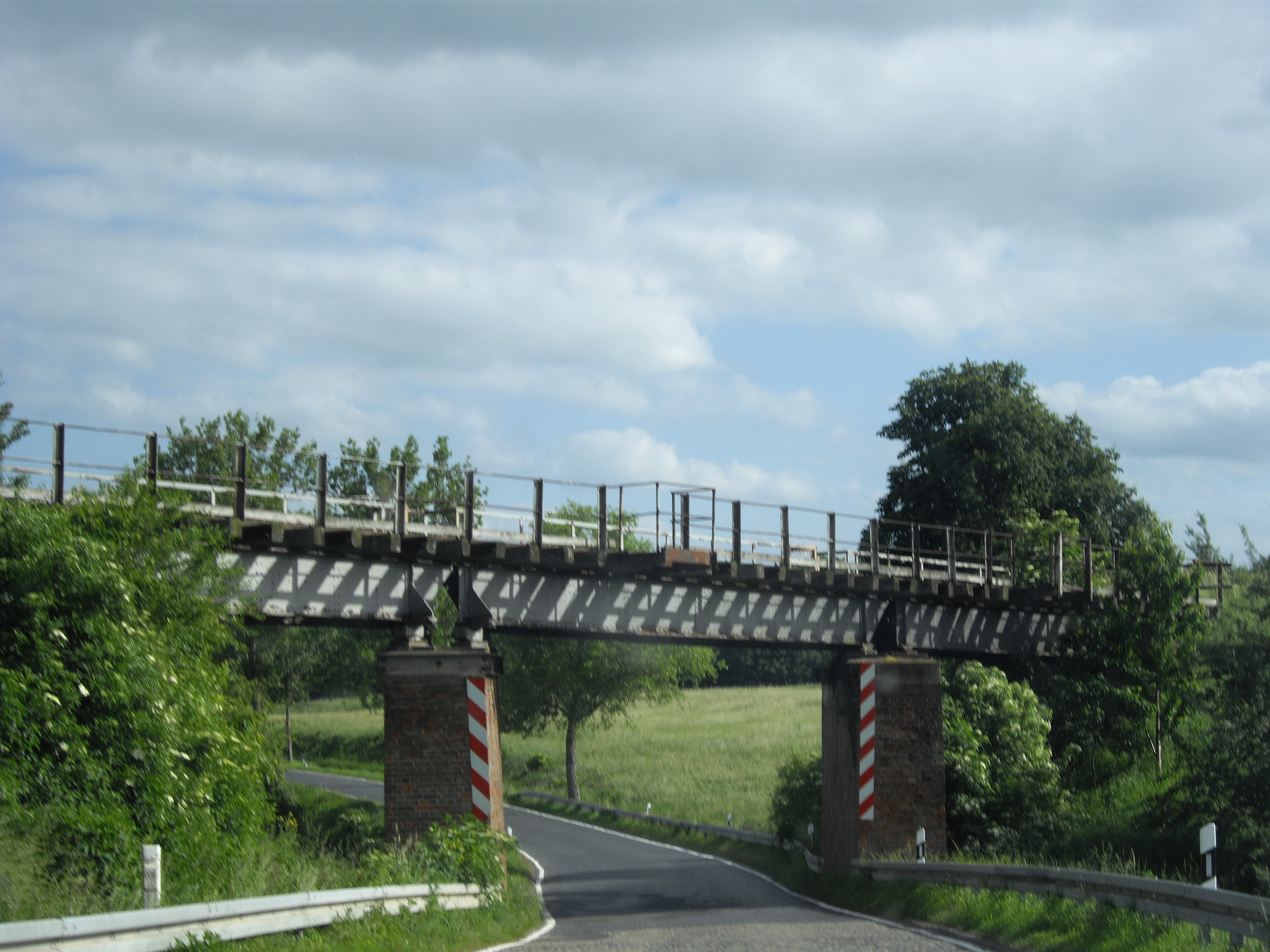 Brücke der Stillgelegten Bahnstrecke Hettstedt-Halle bei Heiligenthal